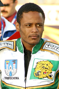 Antonio Lindback